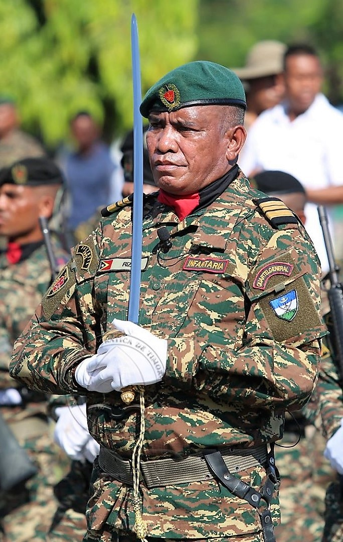 Marcelino Ximenes "Rizzai" bei den Feierlichkeiten zum Proklamationstag 2019